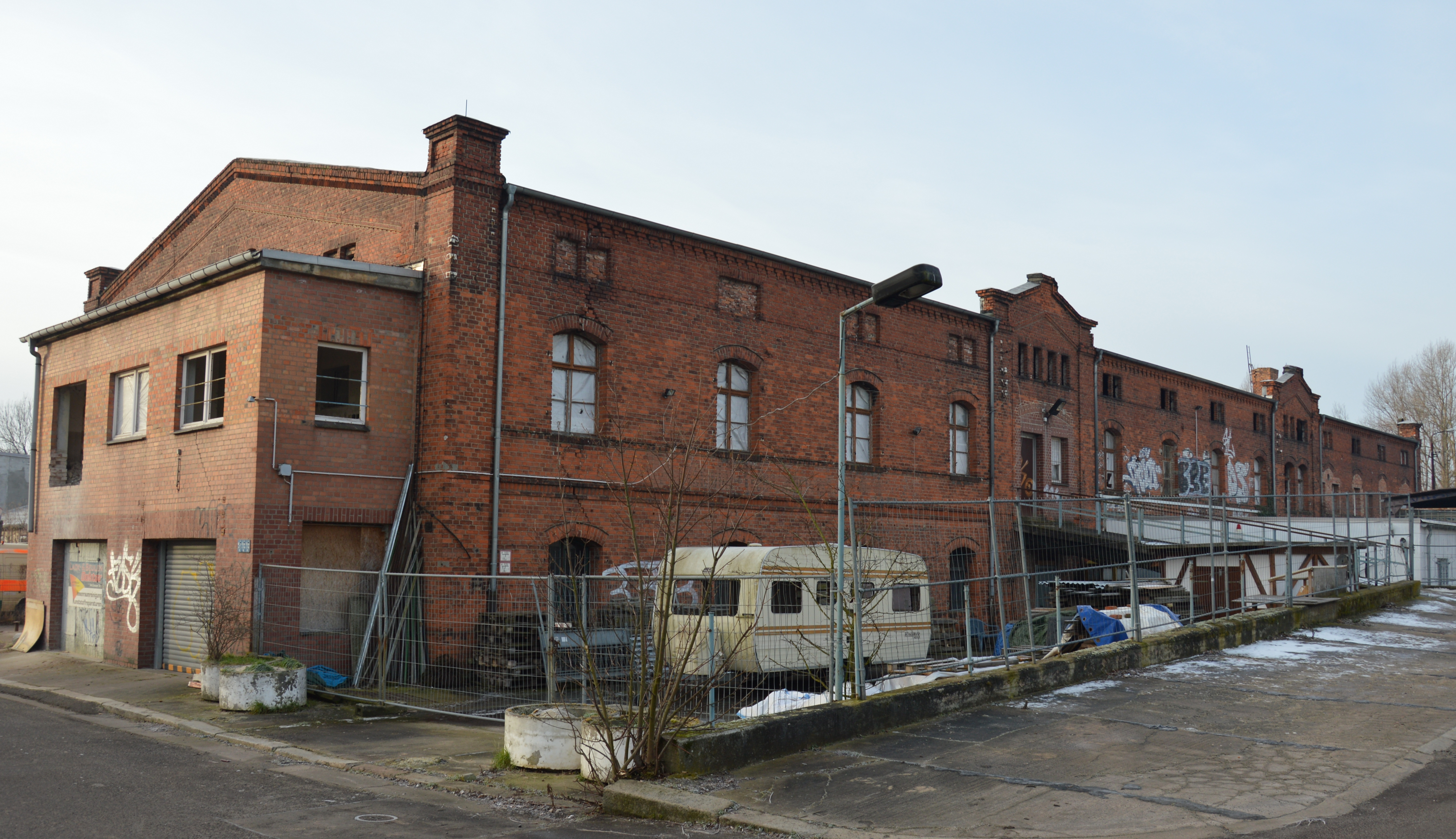 Turmschanzenstraße 2